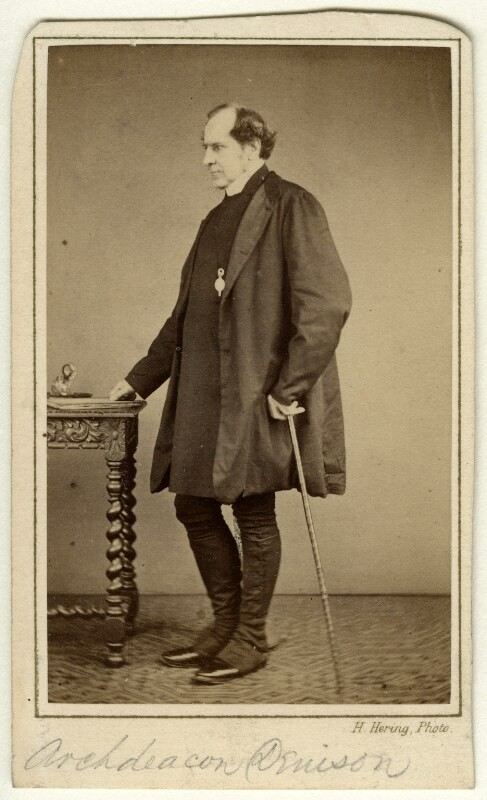 Photograph by Henry Hering